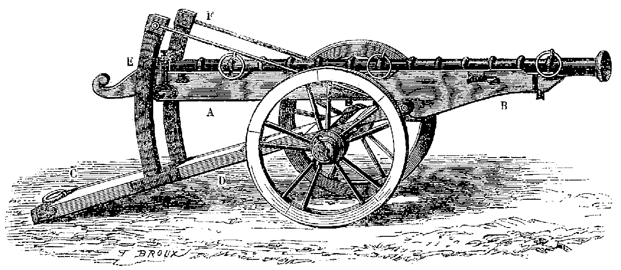 Serpentine de Charles-le-Téméraire (canon dépourvu de tourillons, et muni d’un pointard en arc de cercle)